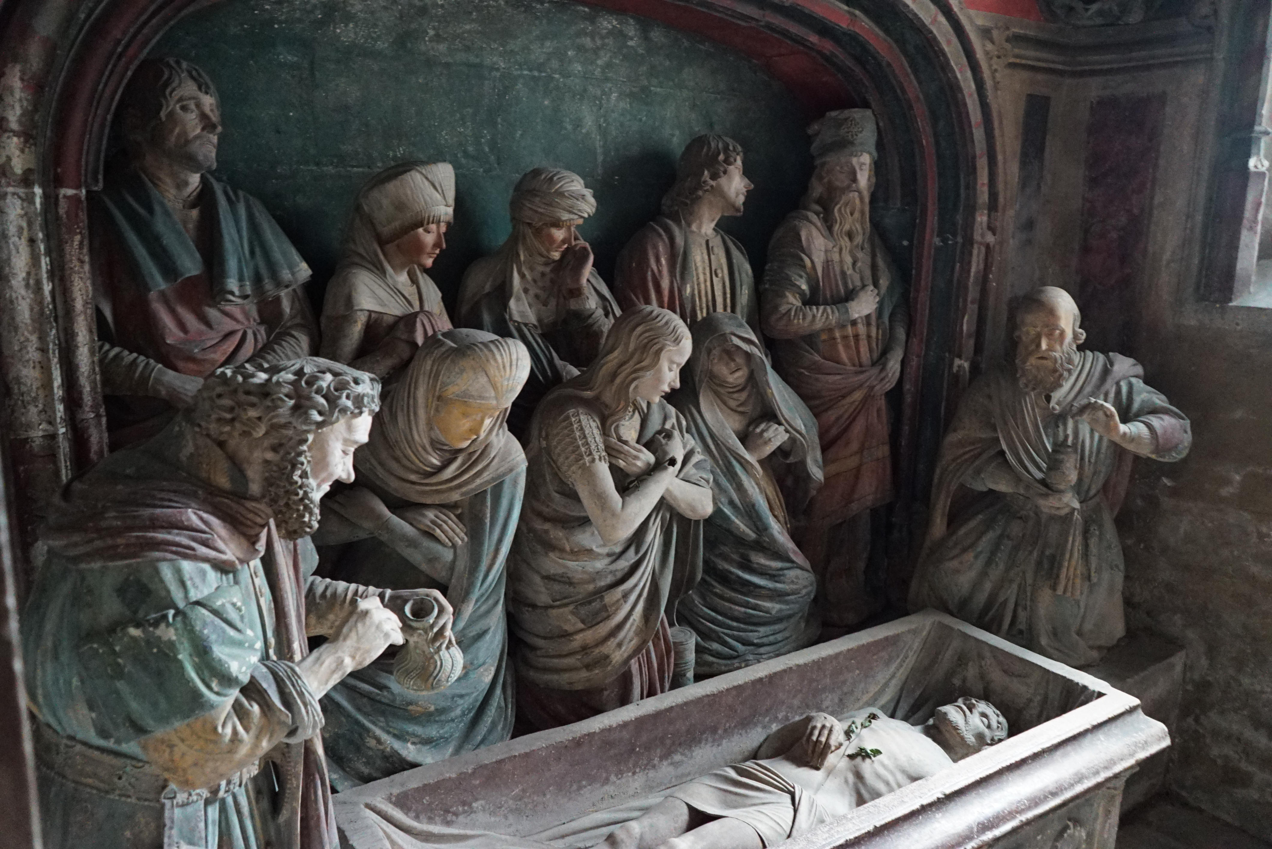 vue de l'intérieur de la chapelle.